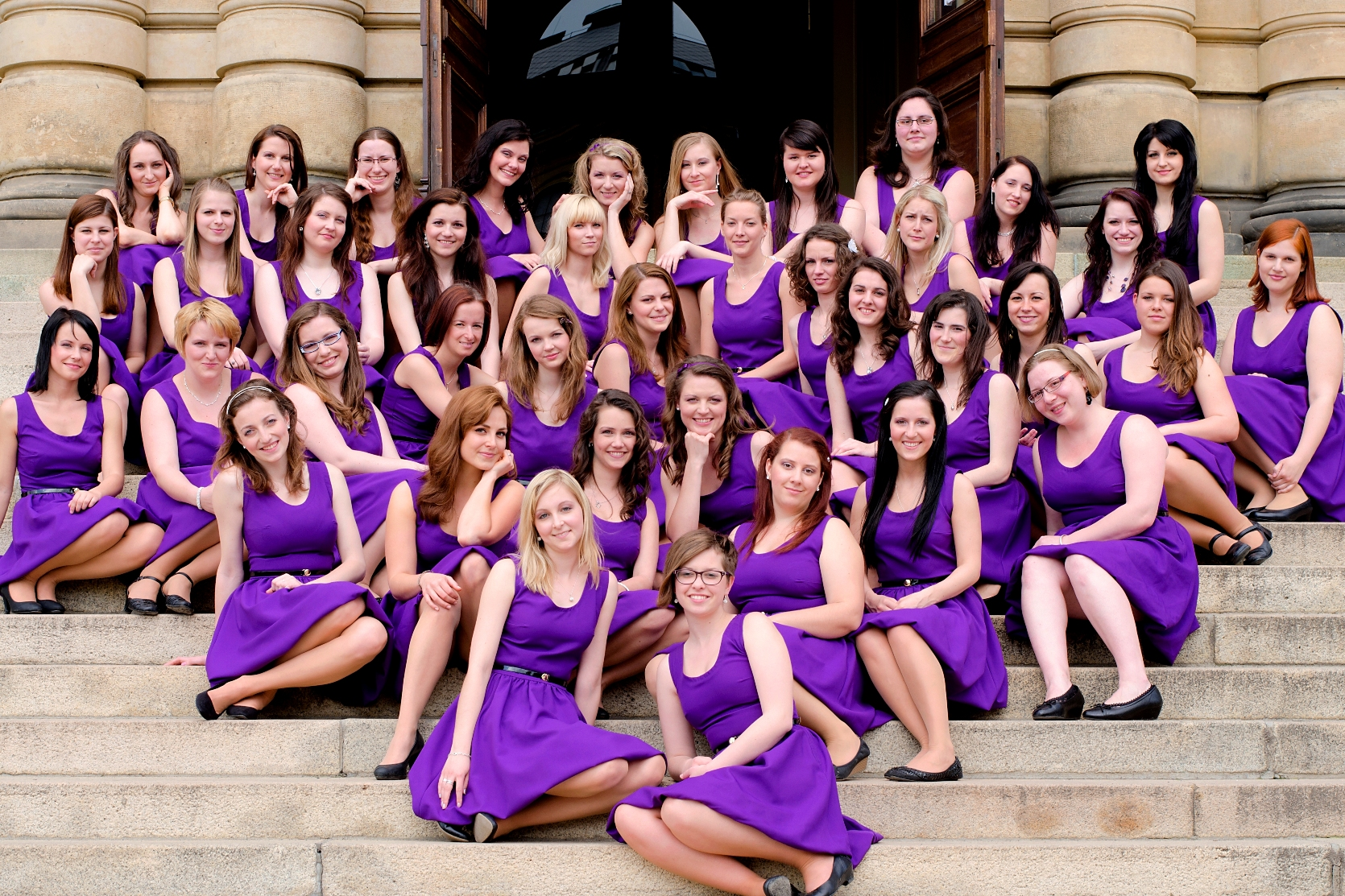 Cancioneta Praga